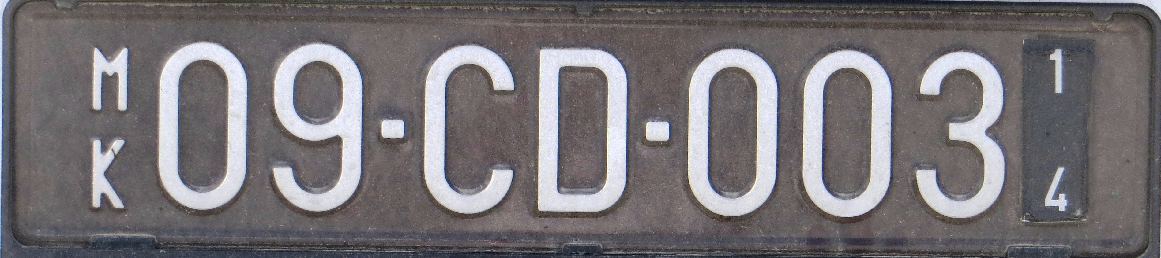 CD kenteken Macedonië